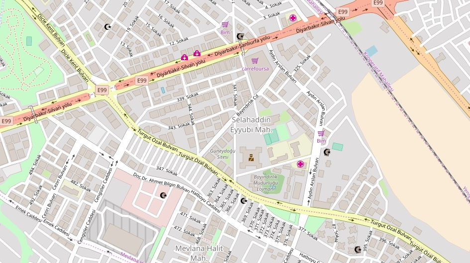 Kasım 2016 Diyarbakır saldırısı (Bağlar ilçesinde Aydın Arslan Bulvarı Emniyet Müdürlüğü) This map of Bağlar, Diyarbakır, in front of the Bağlar Police Santral was created from OpenStreetMap project data, collected by the community. This map may be incomplete, and may contain errors. Don't rely solely on it for navigation.